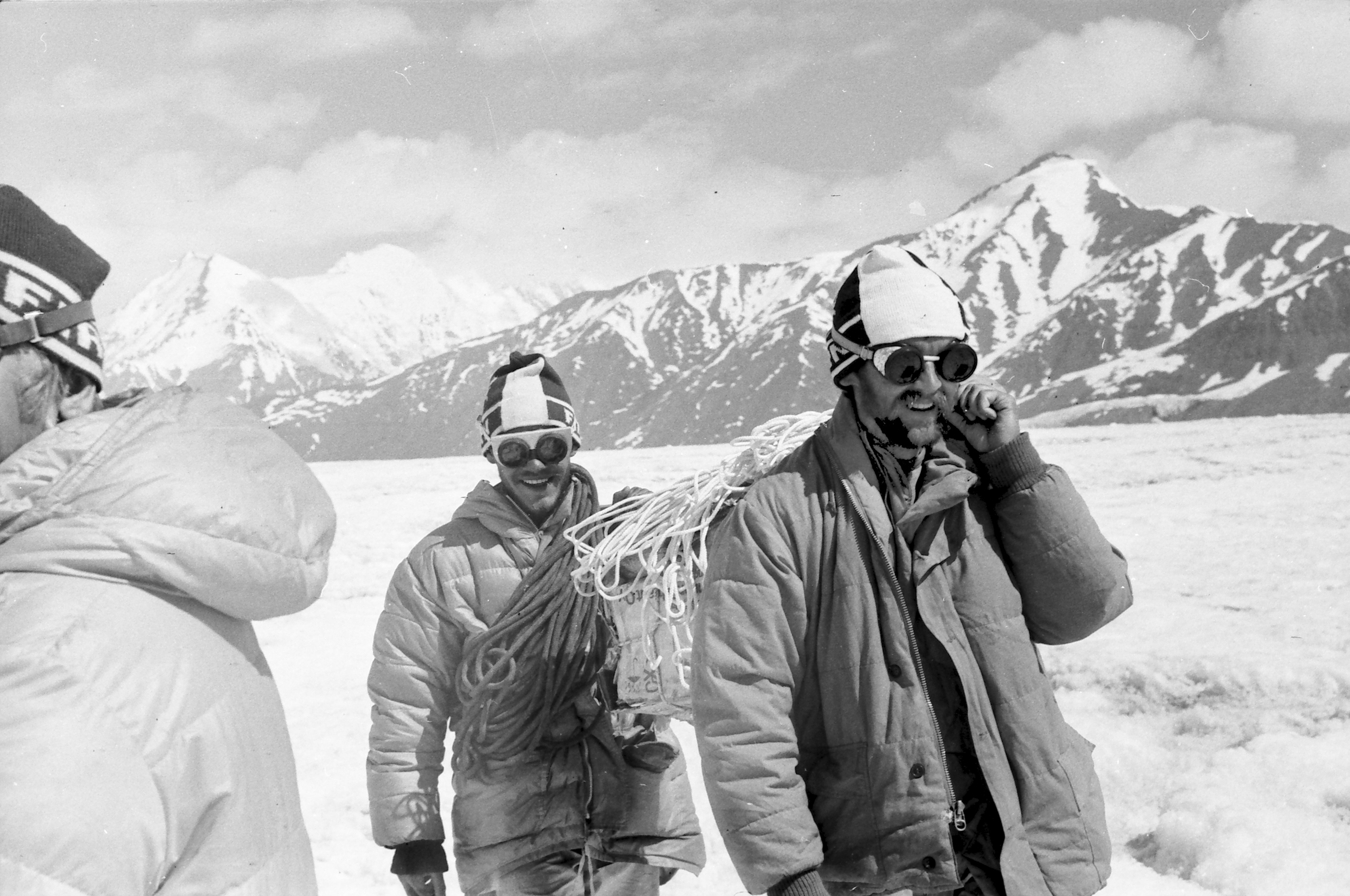 Ekspeditsioon mäetipule "Tartu Ülikool 350".